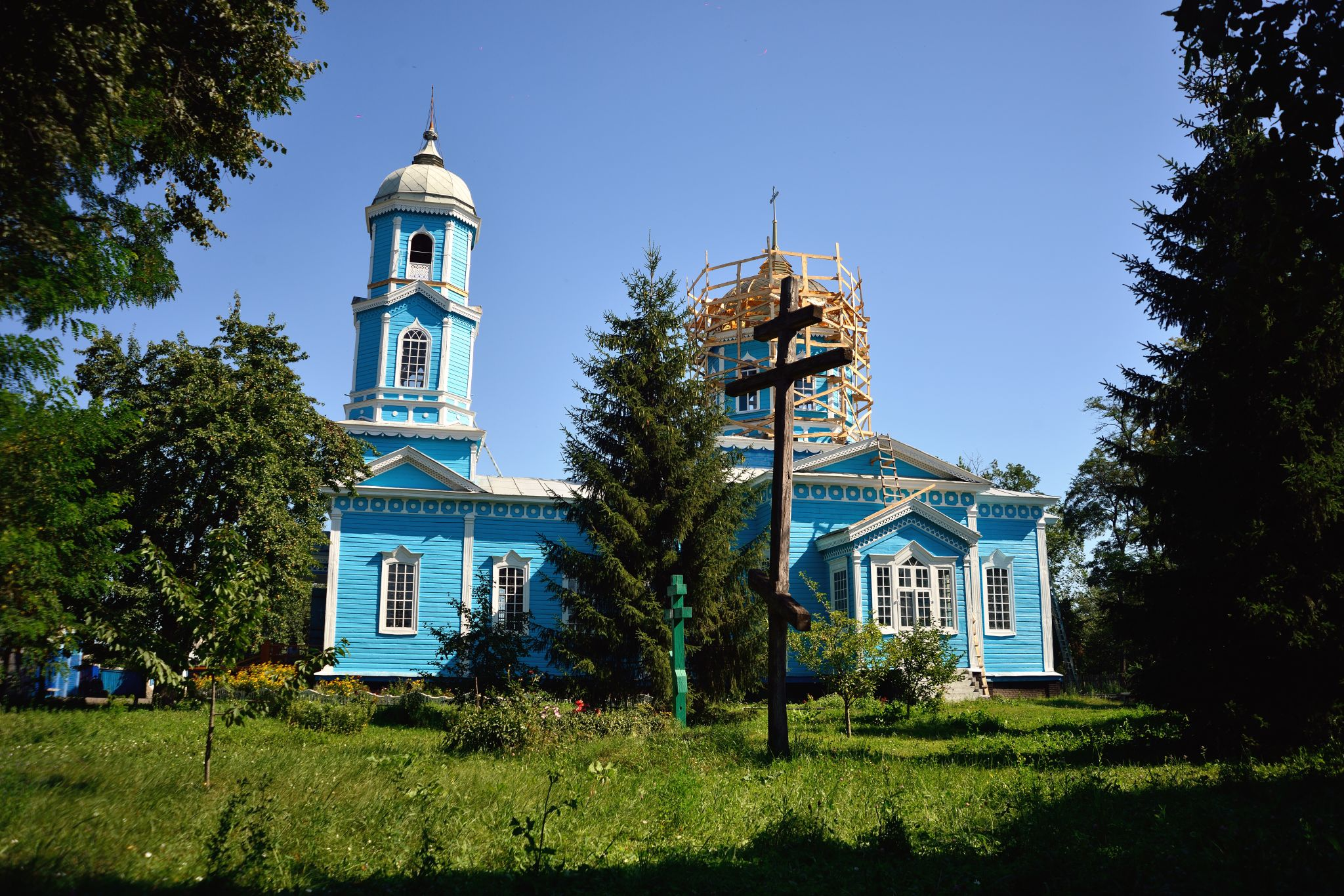 Церква в ім'я Покрова Пресвятої Богородиці (дер.), Сари